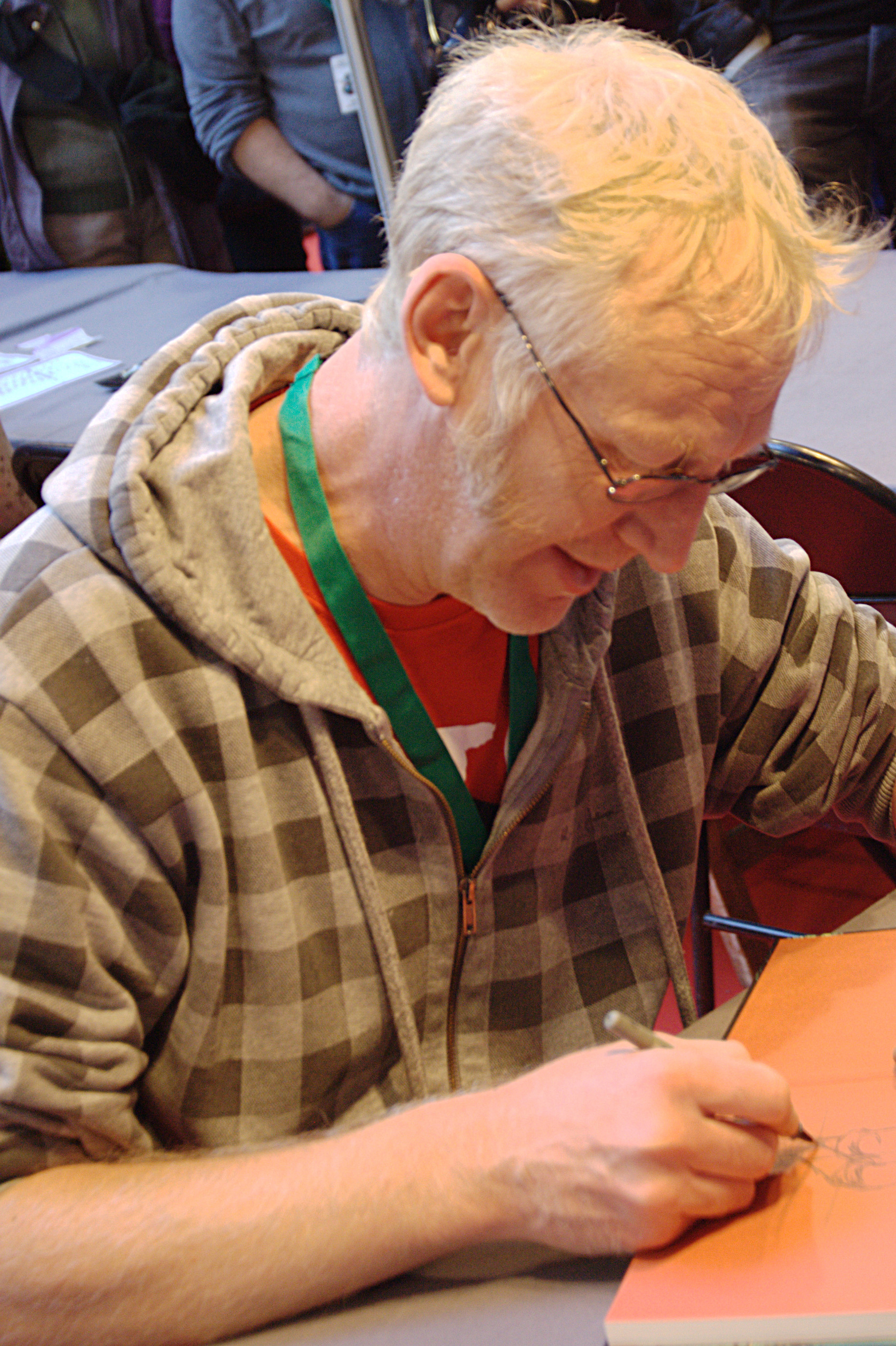 Riff Reb's lors de Quai des Bulles à Saint-Malo le 27 octobre 2012.